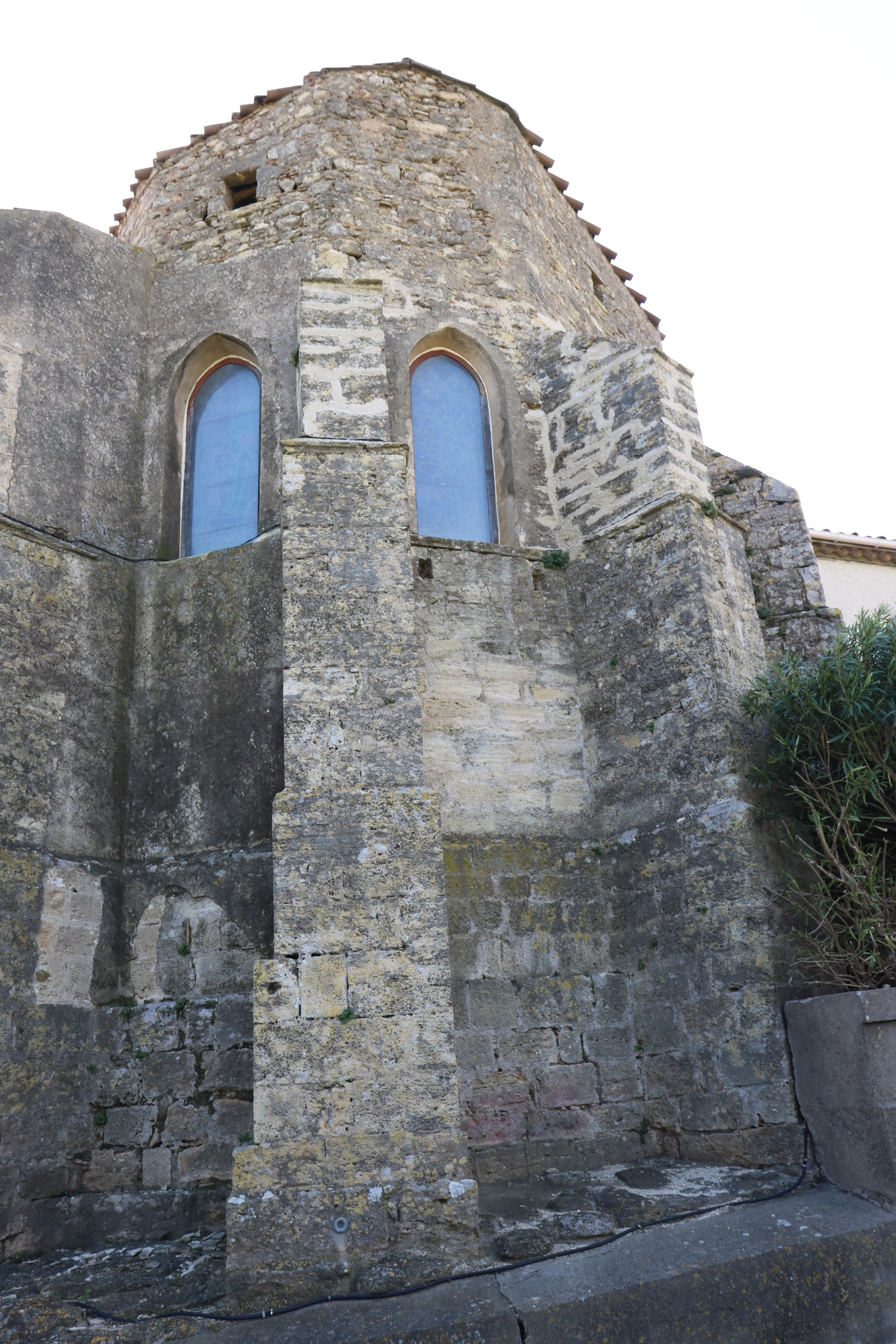 Coulobres (Hérault) - église Saint-Félix-de-Gérone - chevet